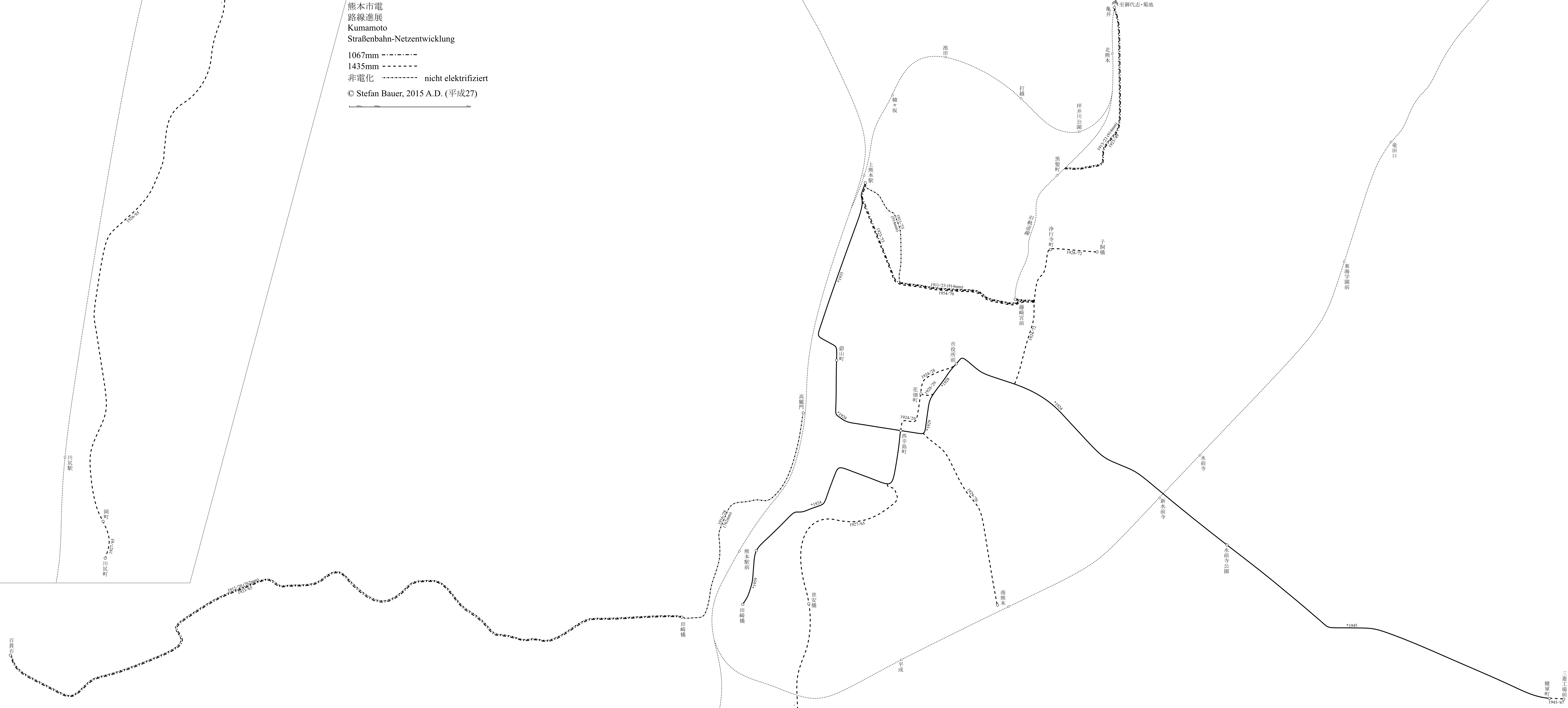 熊本市電の路線進展図